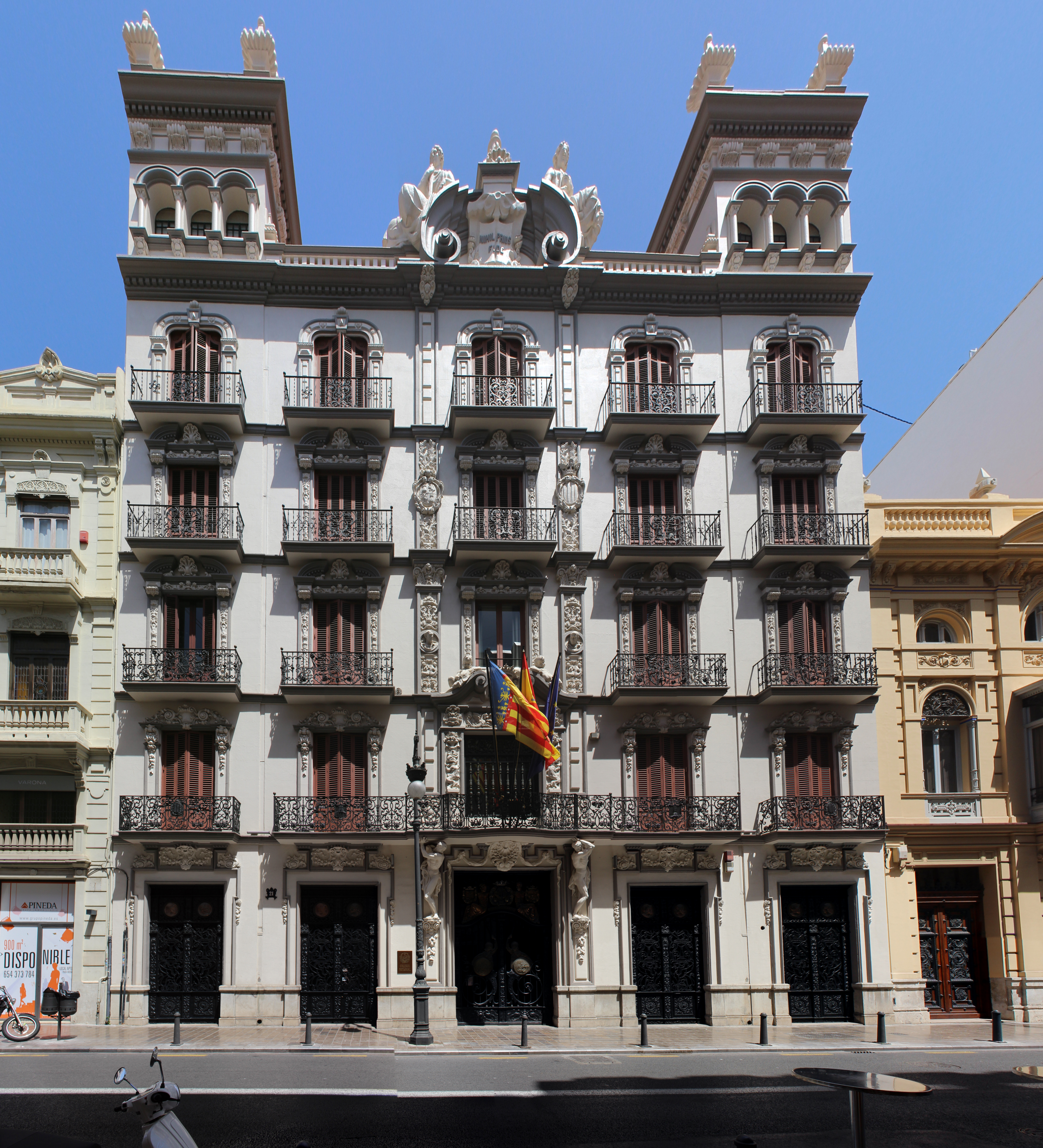 Colegio Notarial en la calle Pascual y Genís número 21 de Valencia. Obra de Joaquín Mª Belda reformado por Manuel Peris Ferrando